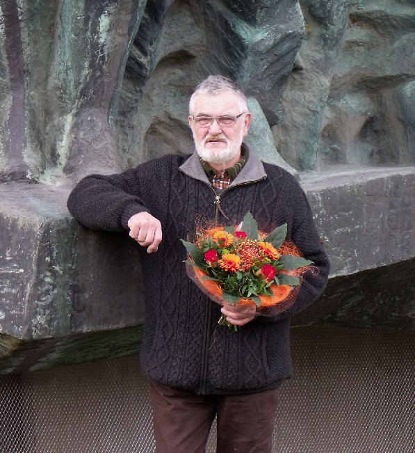 Der Bildhauer Klaus Schwabe vor dem Bronzerelief „Aufbruch“.